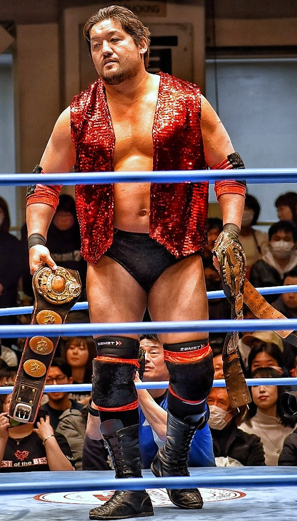 全日本プロレス所属の石川修司